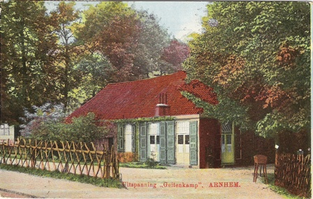 Ansichtkaart van de voormalige uitspanning "Geitenkamp" in Arnhem